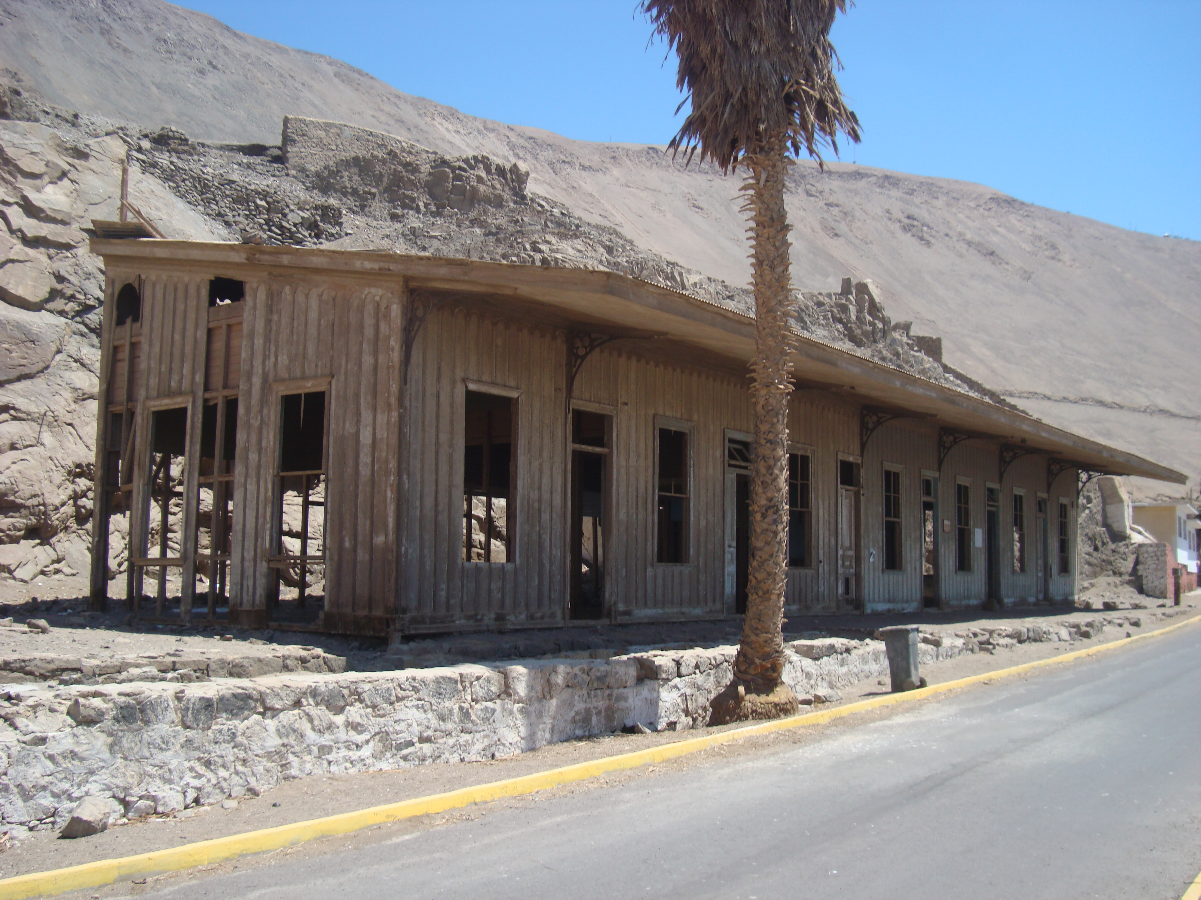 Pisagua, en noviembre de 2017